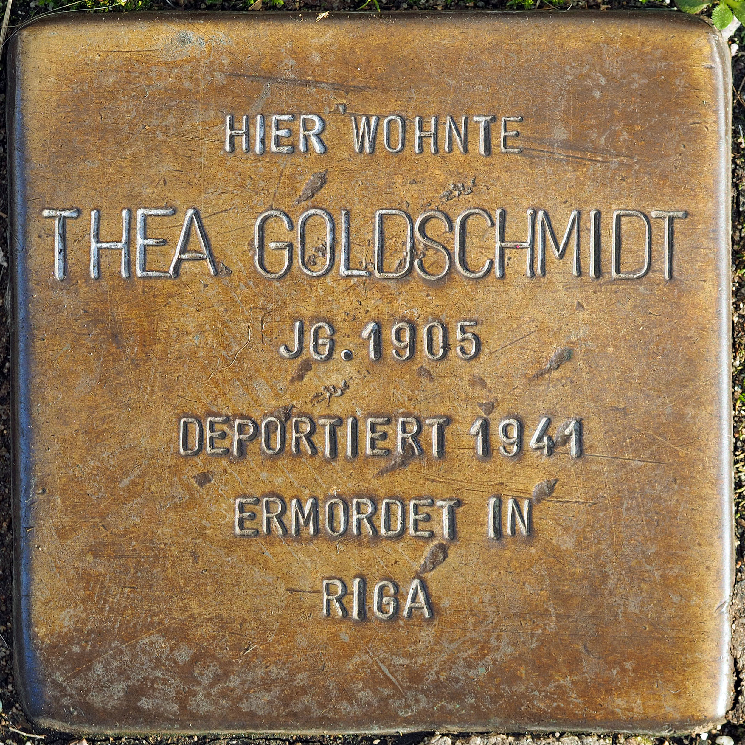 Stolperstein DU 290: Goldschmidt, Thea